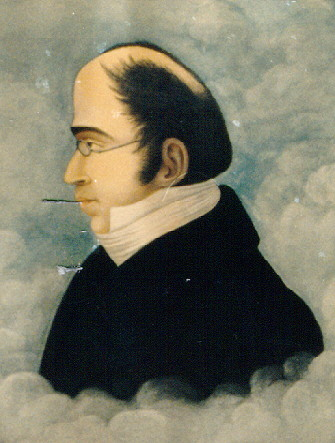 Santorre di Santarosa